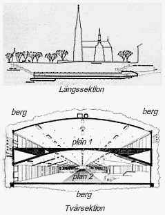 Skyddsrummet under S:t Johannes kyrka i Stockholm, bearbetning av äldre ritning genom Holger.Ellgaard